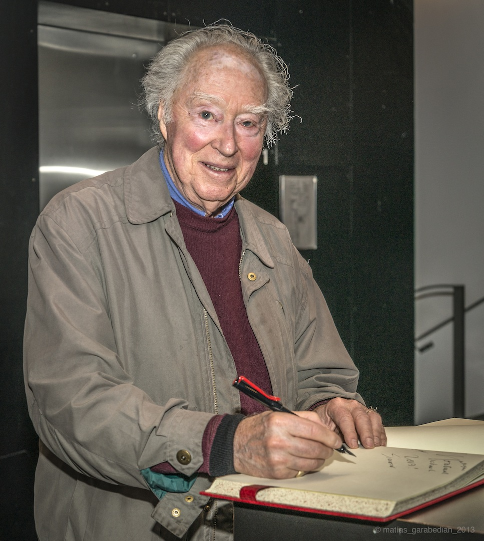 Une installation lumineuse permanente sur la façade exterieure de la cinémathèque quebécoise à Montréal.